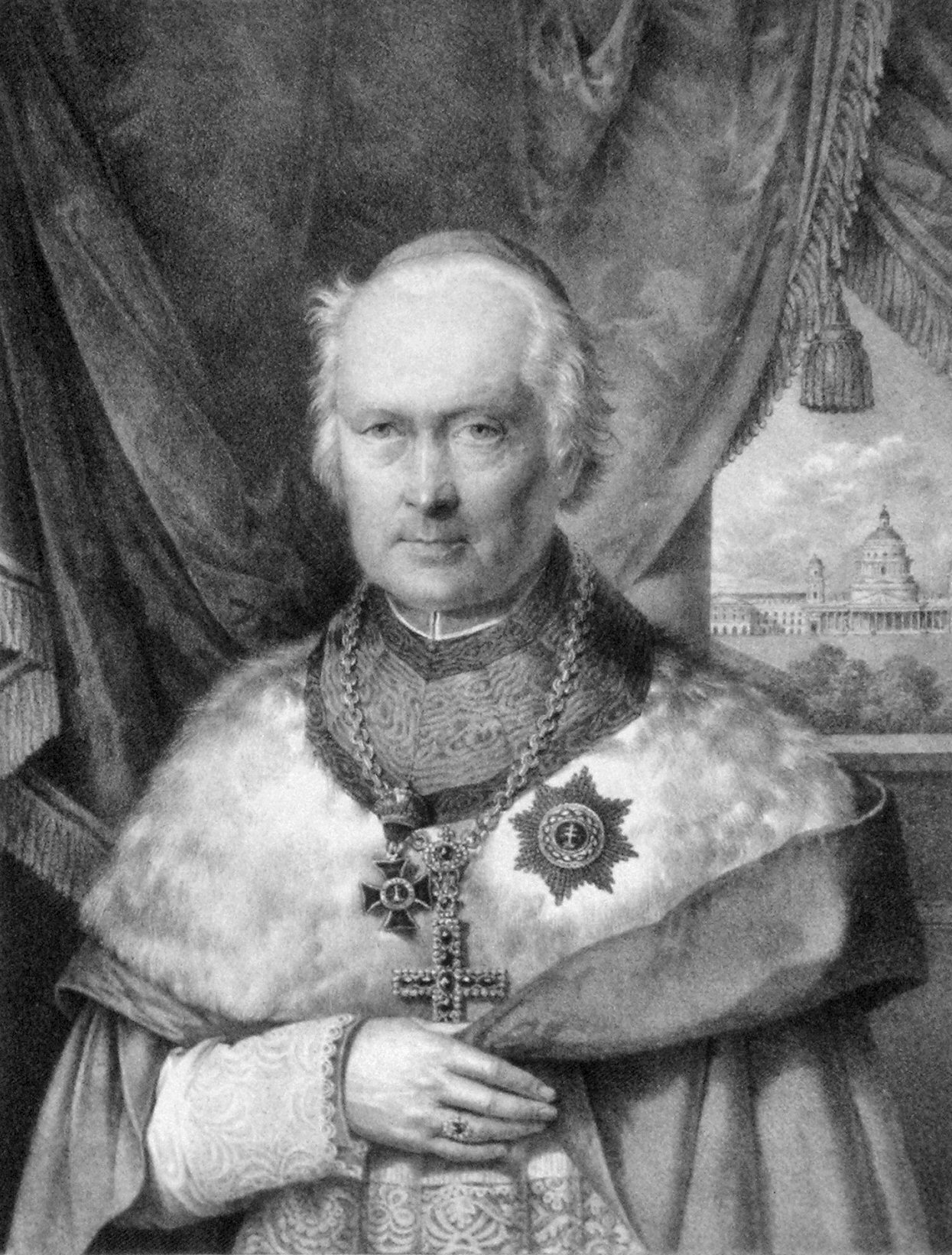 Alexander Rudnay, Lithographie von Friedrich Lieder (+1859)